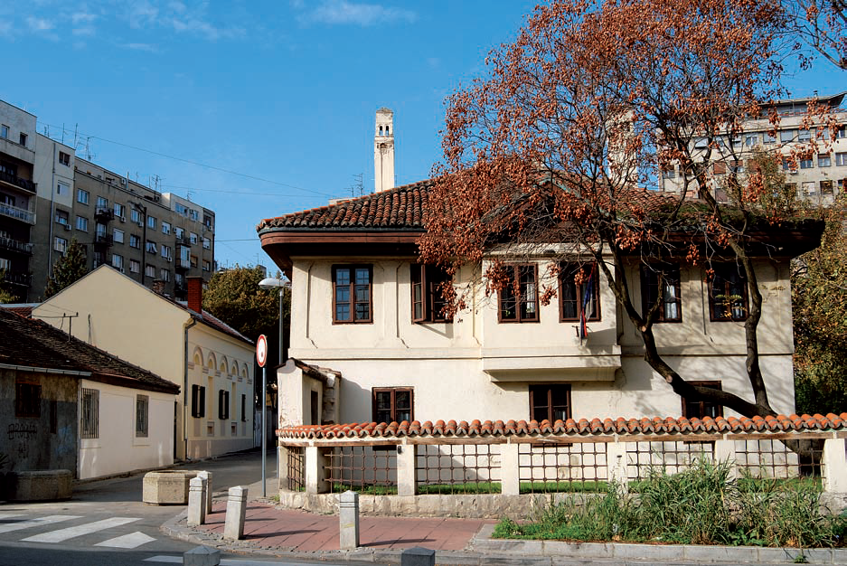 Насловна, С.Неговановић